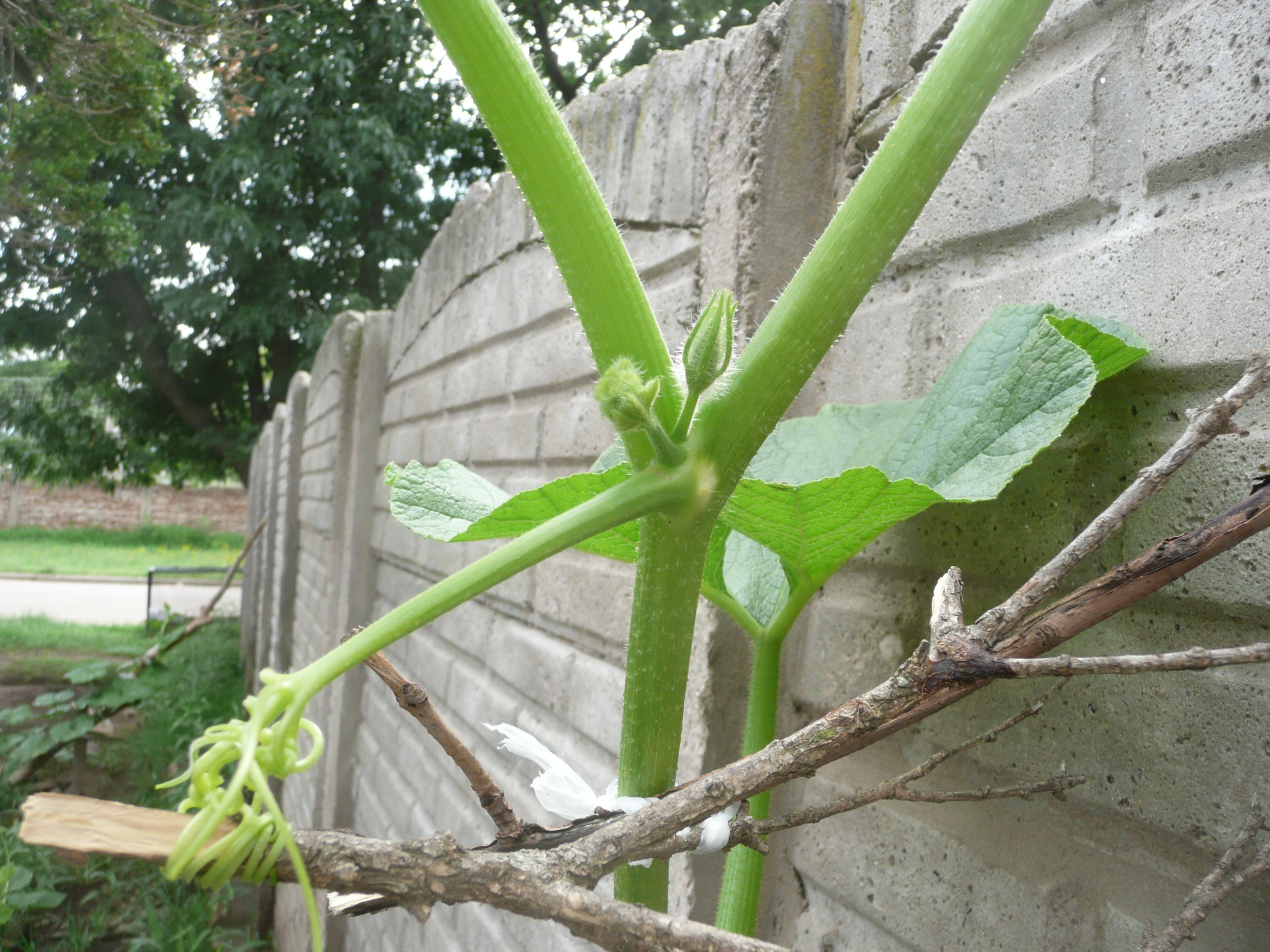 Fortín Olavarría, Buenos Aires province, Argentina.